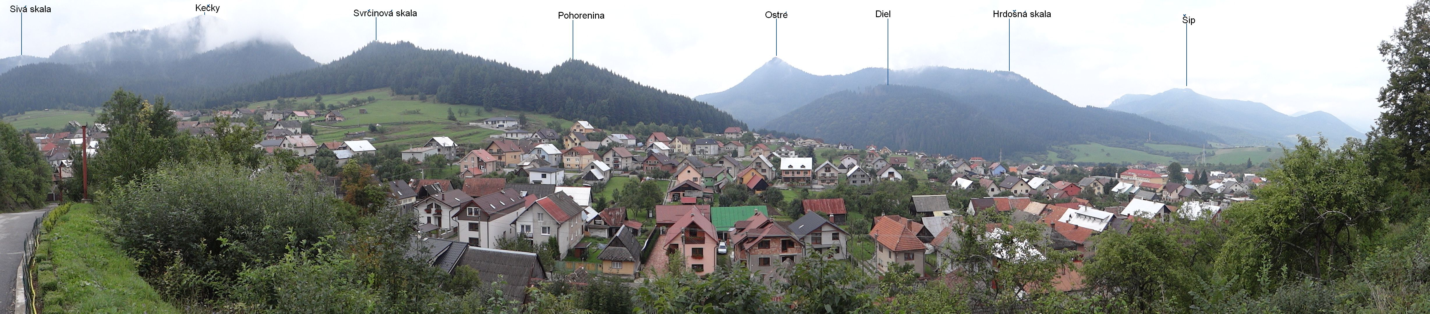 Komjatná